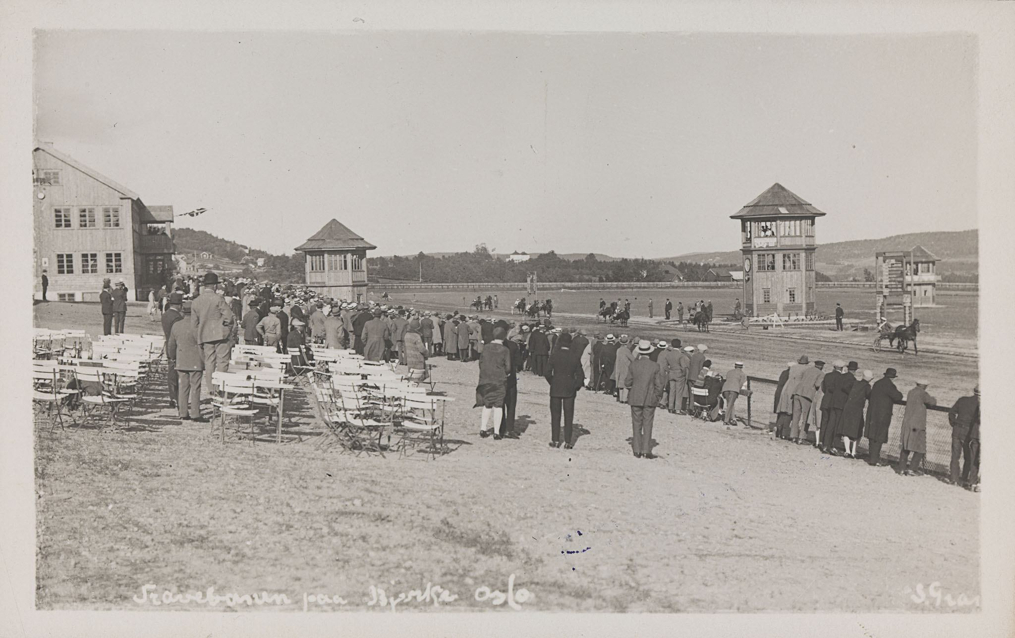 Tittel / Title: Travbanen paa Bjerke, Oslo Beskrivelse / Description: Postkort. Dato / Date: ca 1929 Fotograf / Photographer: ukjent / unknown Utgiver / Publisher: S. Gran Sted / Place: Oslo, Bjerke, Bjerke travbane Eier / Owner Institution: Nasjonalbiblioteket / National Library of Norway Lenke / Link: Bildesignatur / Image Number: bldsa_PK1925